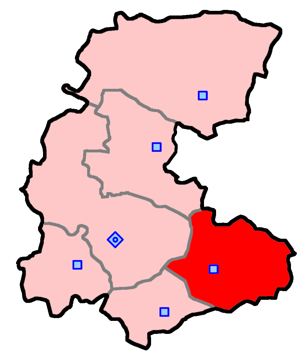 حوزهٔ انتخاباتی محلات و دلیجان برای انتخابات مجلس شورای اسلامی